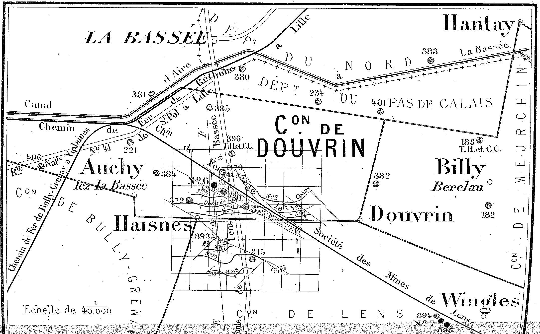 État des travaux de la Compagnie des mines de Douvrin vers 1880, après le rachat par la Compagnie des mines de Lens.